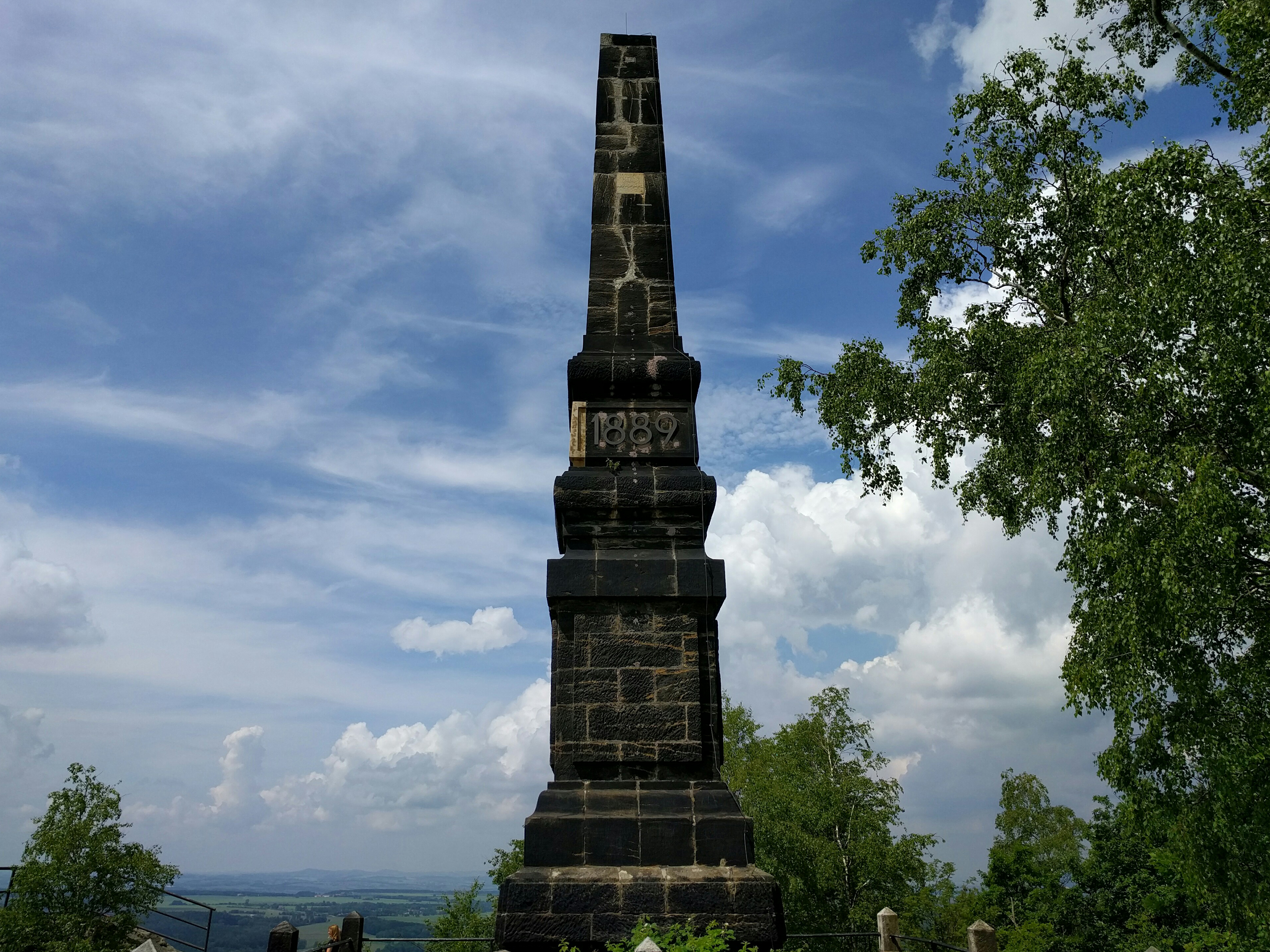 Der Wettin-Obelisk auf der höchsten Stelle des Tafelbergs Lilienstein (415 m) im Nationalpark Sächsische Schweiz in Sachsen. Der 16 Meter hohe Obelisk wurde 1889 vom Gebirgsverein der Sächsischen Schweiz zu Ehren des 800-jährigen Bestehens des Hochadelsgeschlechts der Wettiner (Haus Wettin) errichtet.